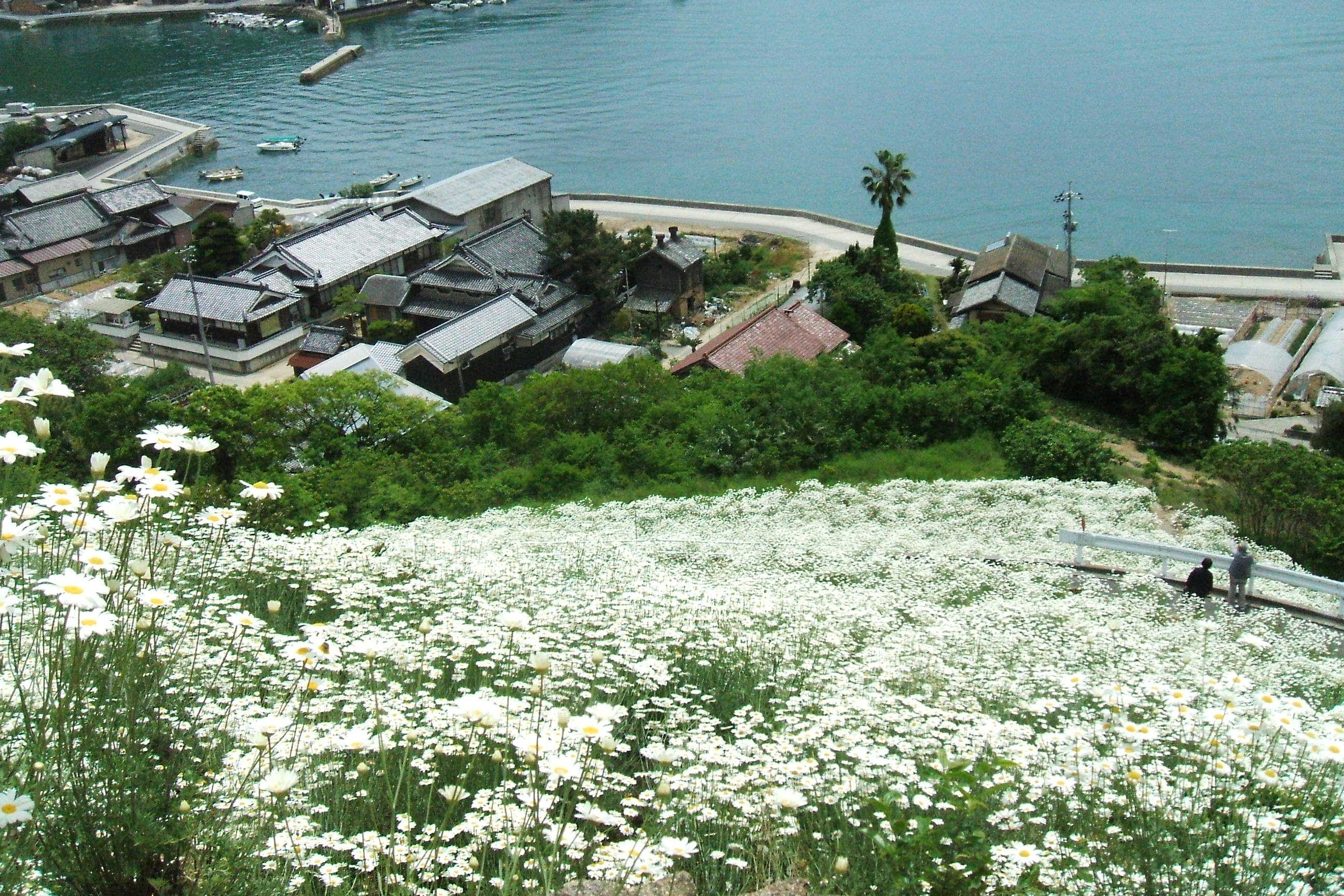 広島県尾道市因島・重井にある除虫菊の畑